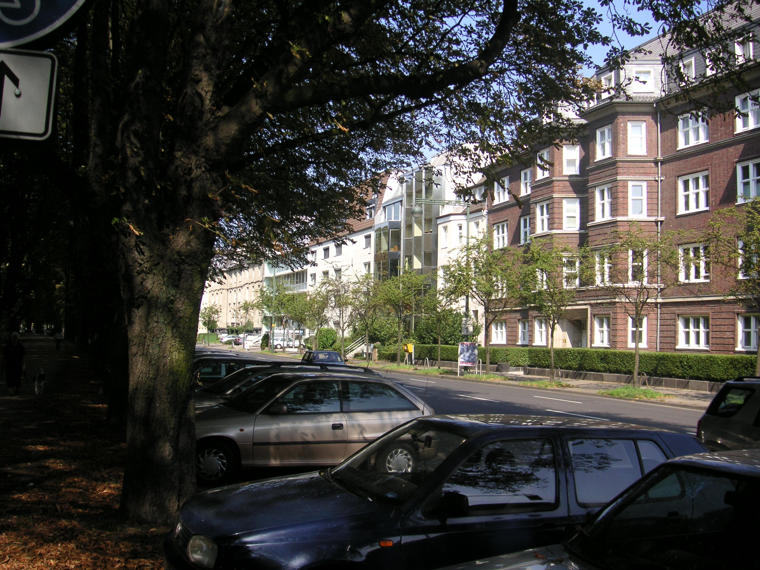 Cecilienallee in Düsseldorf Golzheim